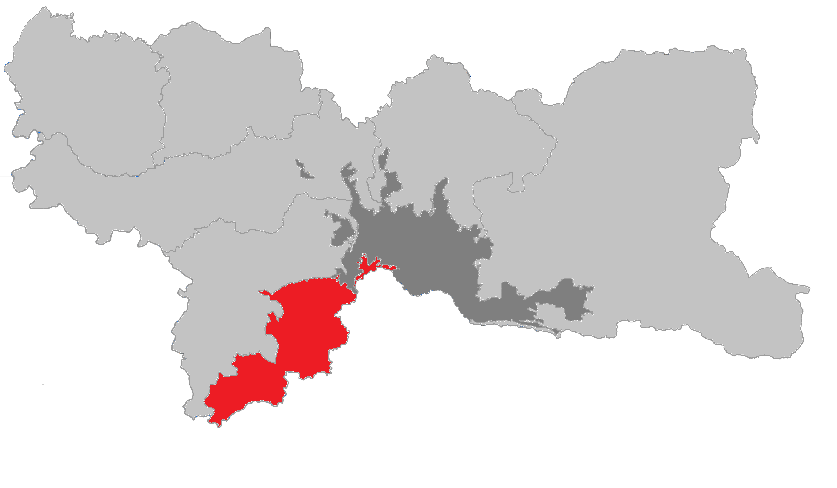 corregimiento de manizales